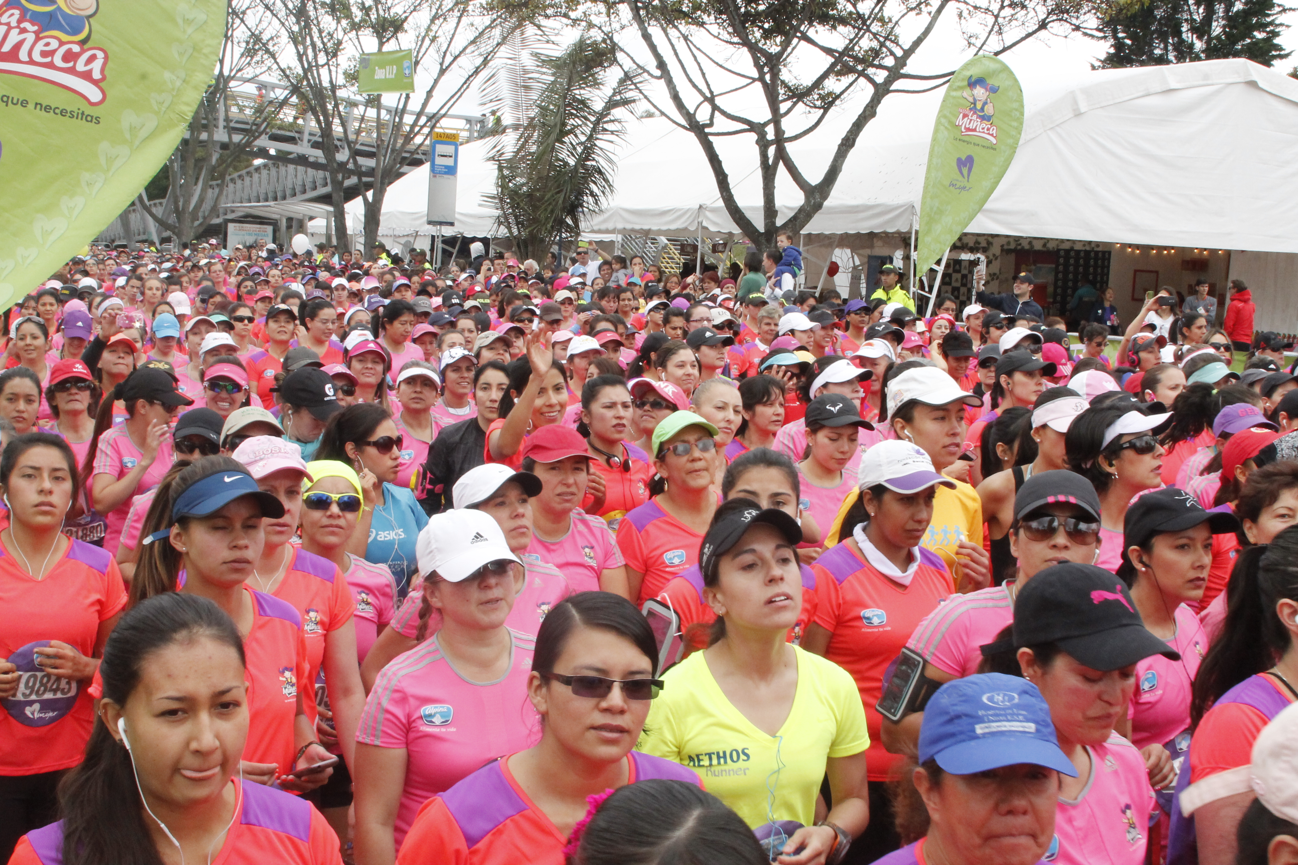 Las mujeres de la Policía Nacional, hicieron su presentación en su octava versión de la Carrera de la Mujer 2014.